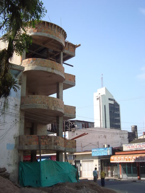 Nuevas construcciones en la ciudad de Florencia (Caquetá).